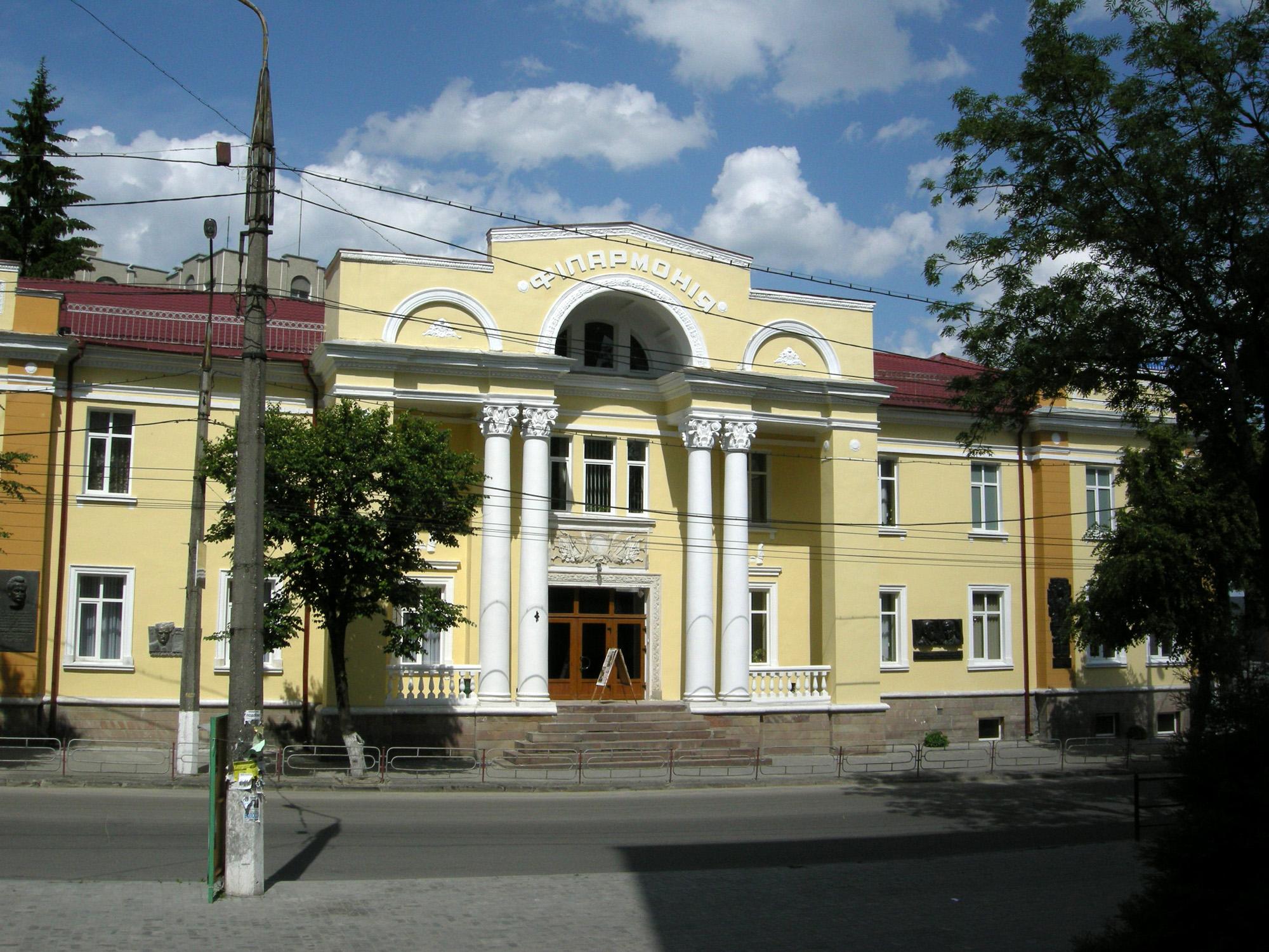 Будівля колишнього «Міщанського братства» (нині — Тернопільська обласна філармонія, Тернопіль, вул. Князя Острозького, 11.